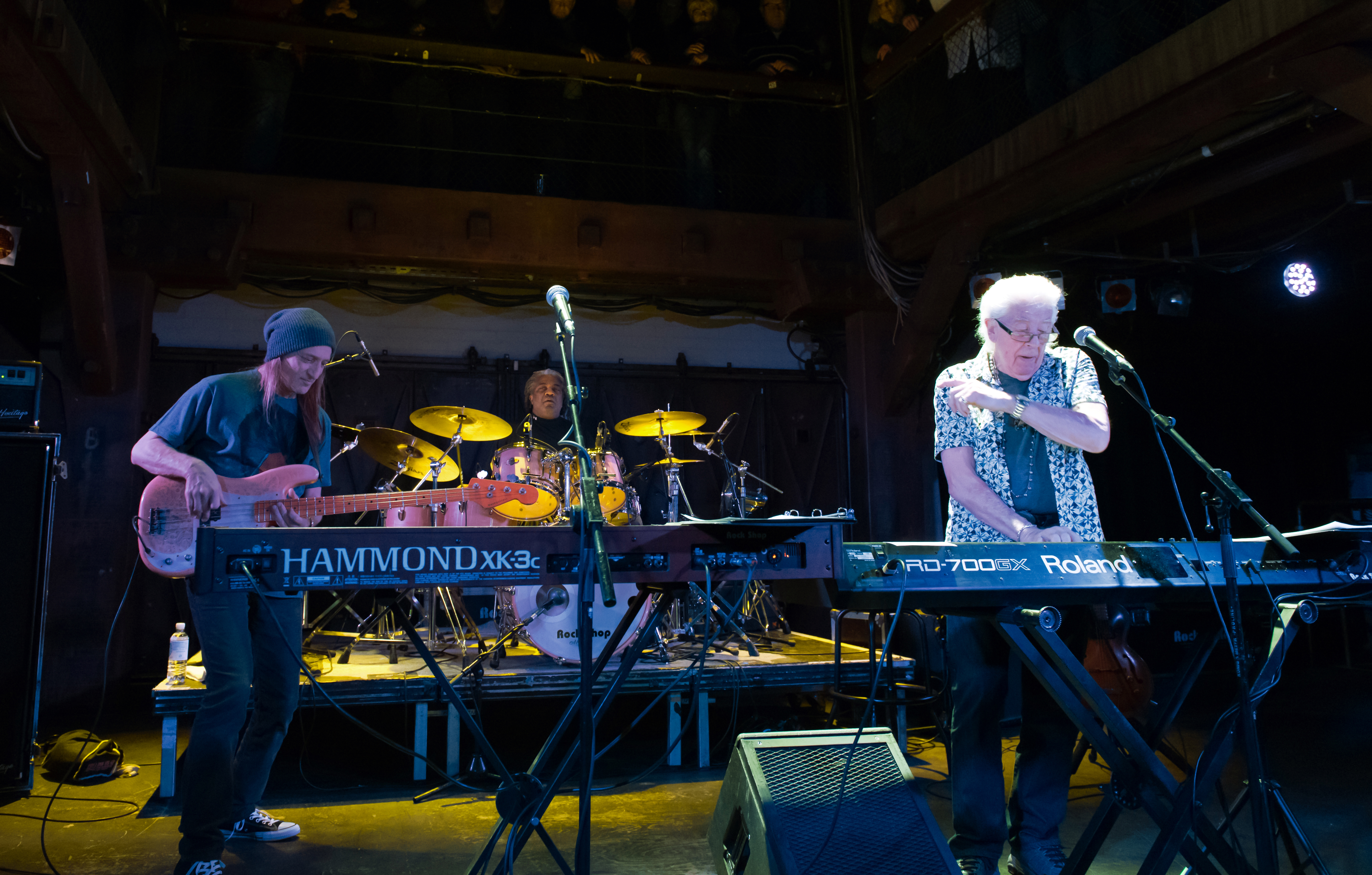 John Mayall mit Band (v.l.n.r. Greg Rzab, Jay Davenport und John Mayall) in der Fabrik Hamburg 2017